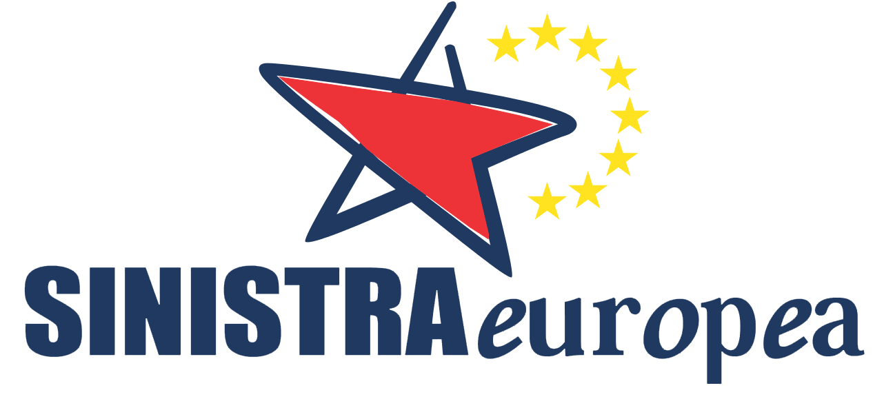 Simbolo della Sinistra Europea